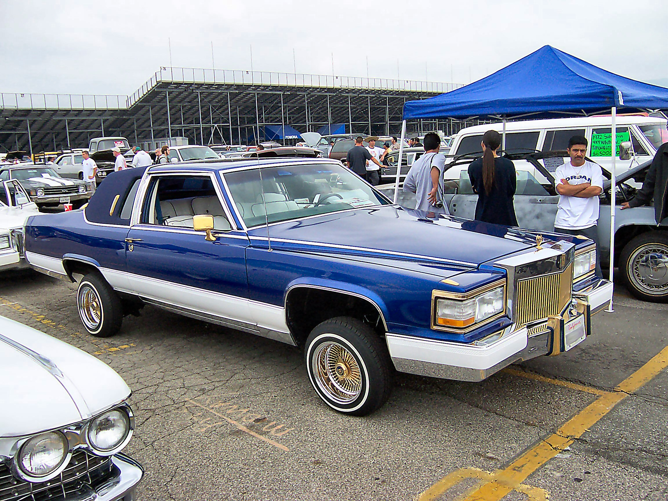 Pimpmobile